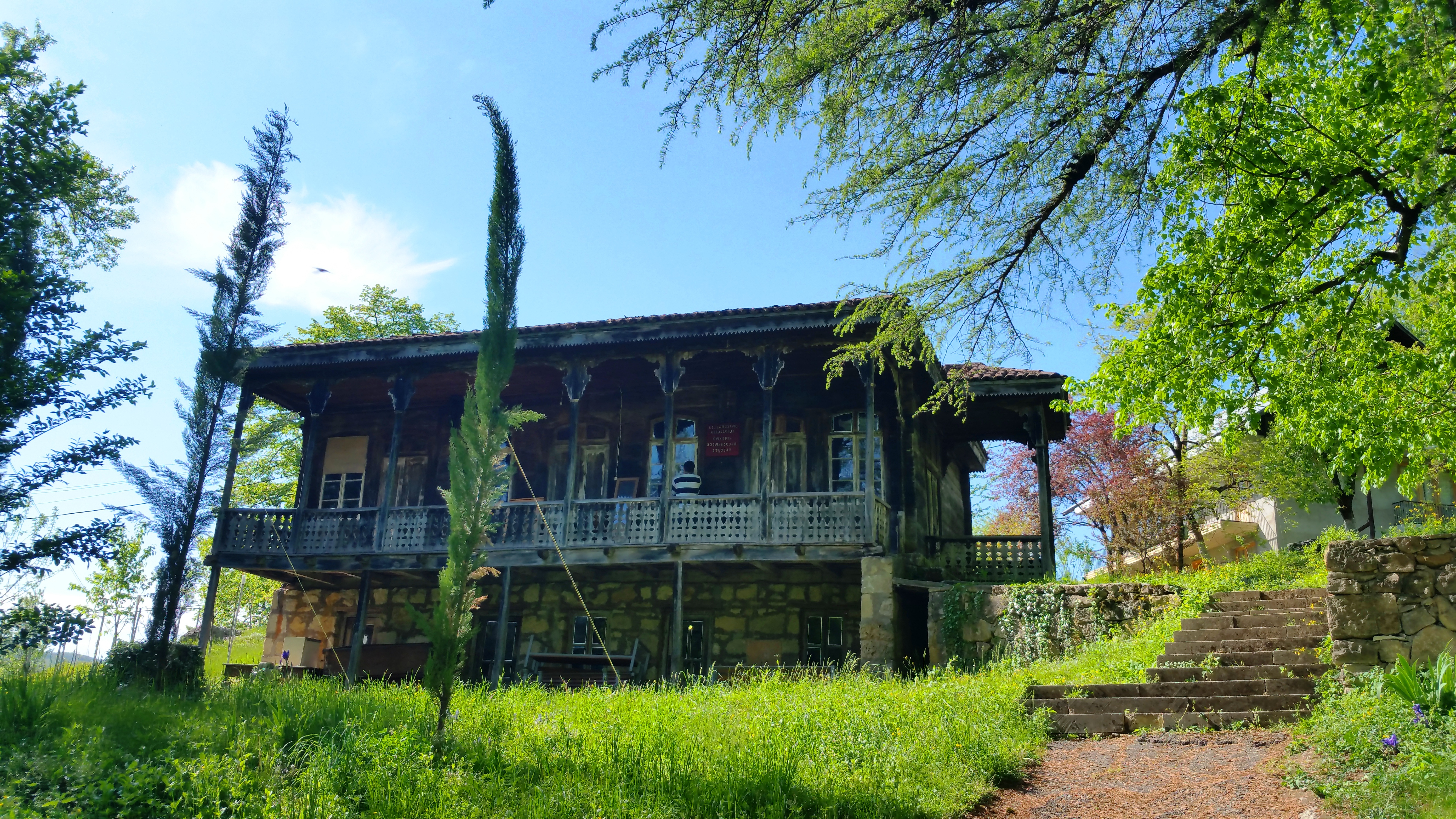 ღორეშას ეთნოგრაფიული მუზეუმი და სერგო ორჯონიკის სახლ-მუზეუმი - ორჯონიკიძის საცხოვრებელი იმერული ოდა სახლი